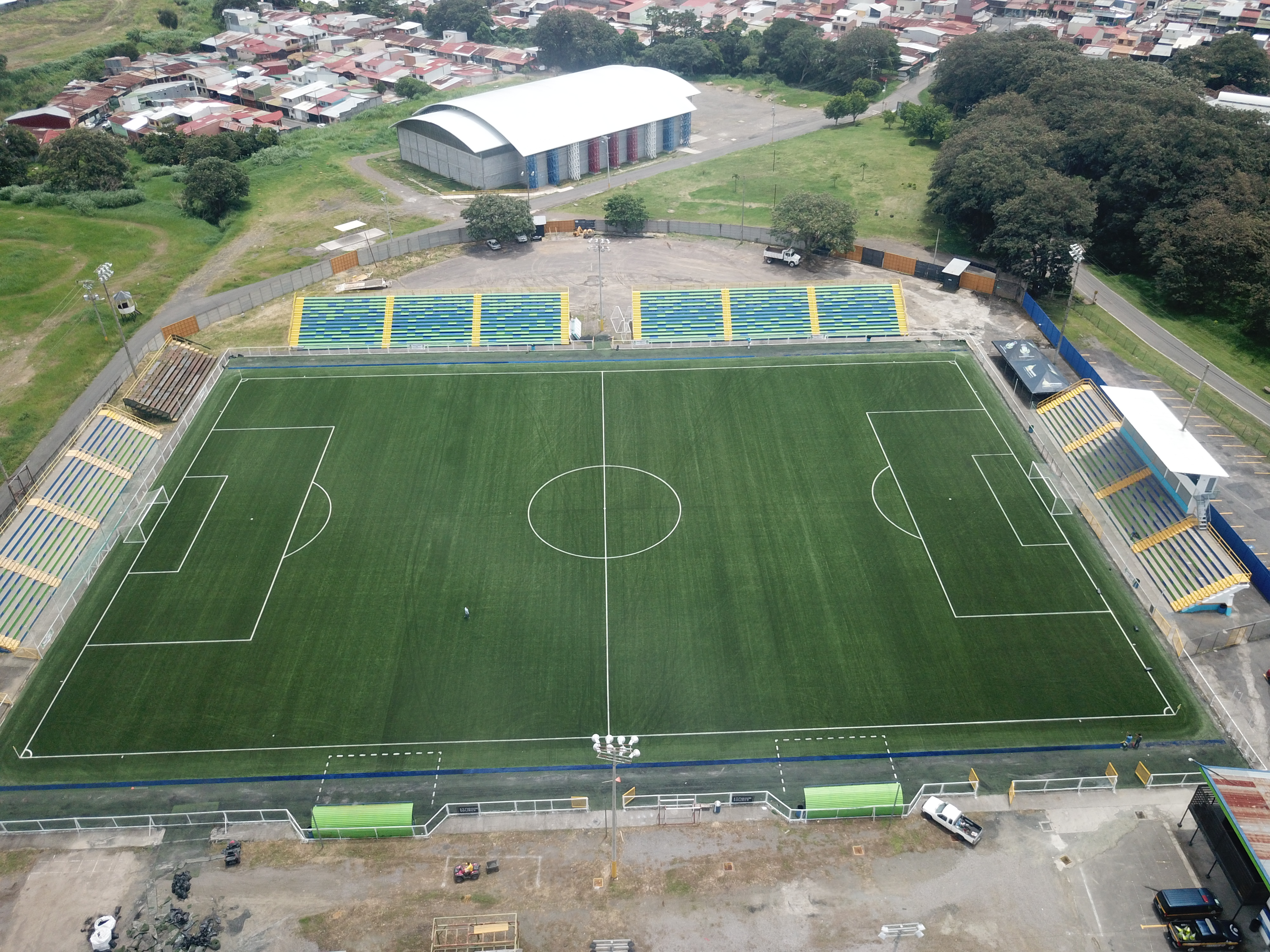 Vista Aérea Estadio "Cuty" Monge - Desamparados